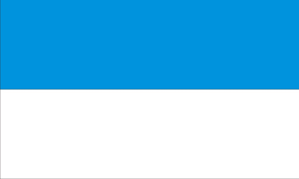 Bandera de Uyuni